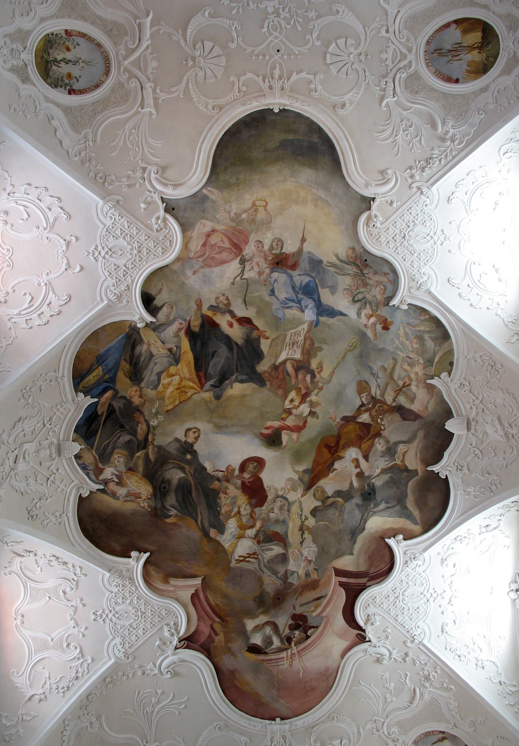 Konstanz, Dreifaltigkeitskirche, Deckenfresko "Aufnahme des Heiligen Augustinus in den Himmel", Franz Joseph Spiegler, 1740